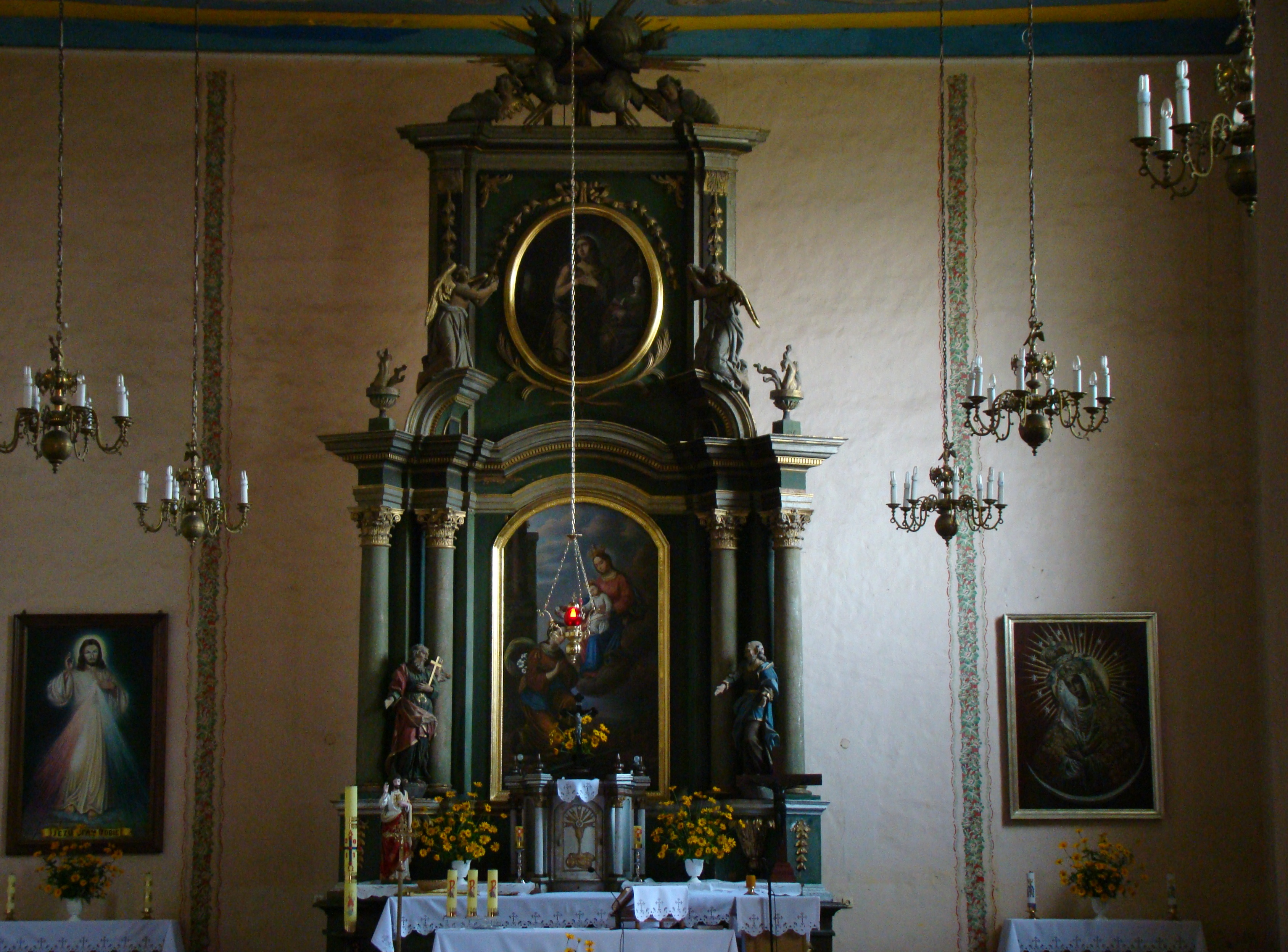 Henrykowo - kościół pw. św. Katarzyny wraz z wyposażeniem (zabytek nr A-124 z dn. 28.09.1953)